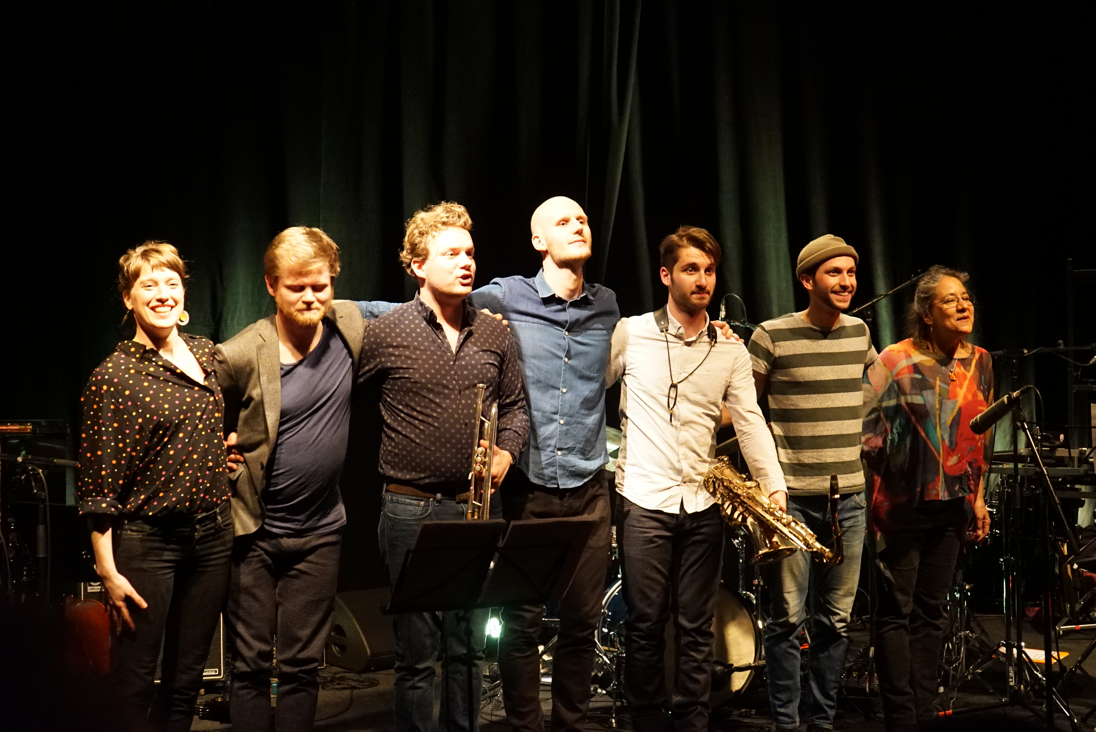 en concert à Reims, salle de saint exupéry.